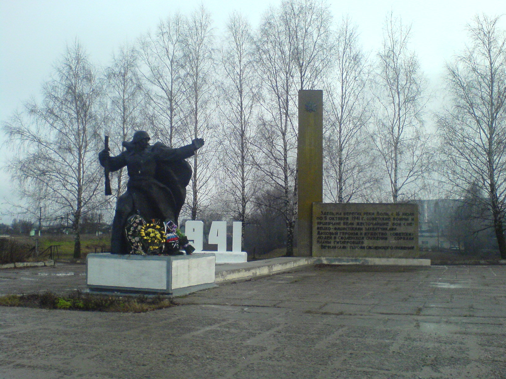 Памятник защитникам г. Ярцево в 1941 году на мосту через р. Вопь